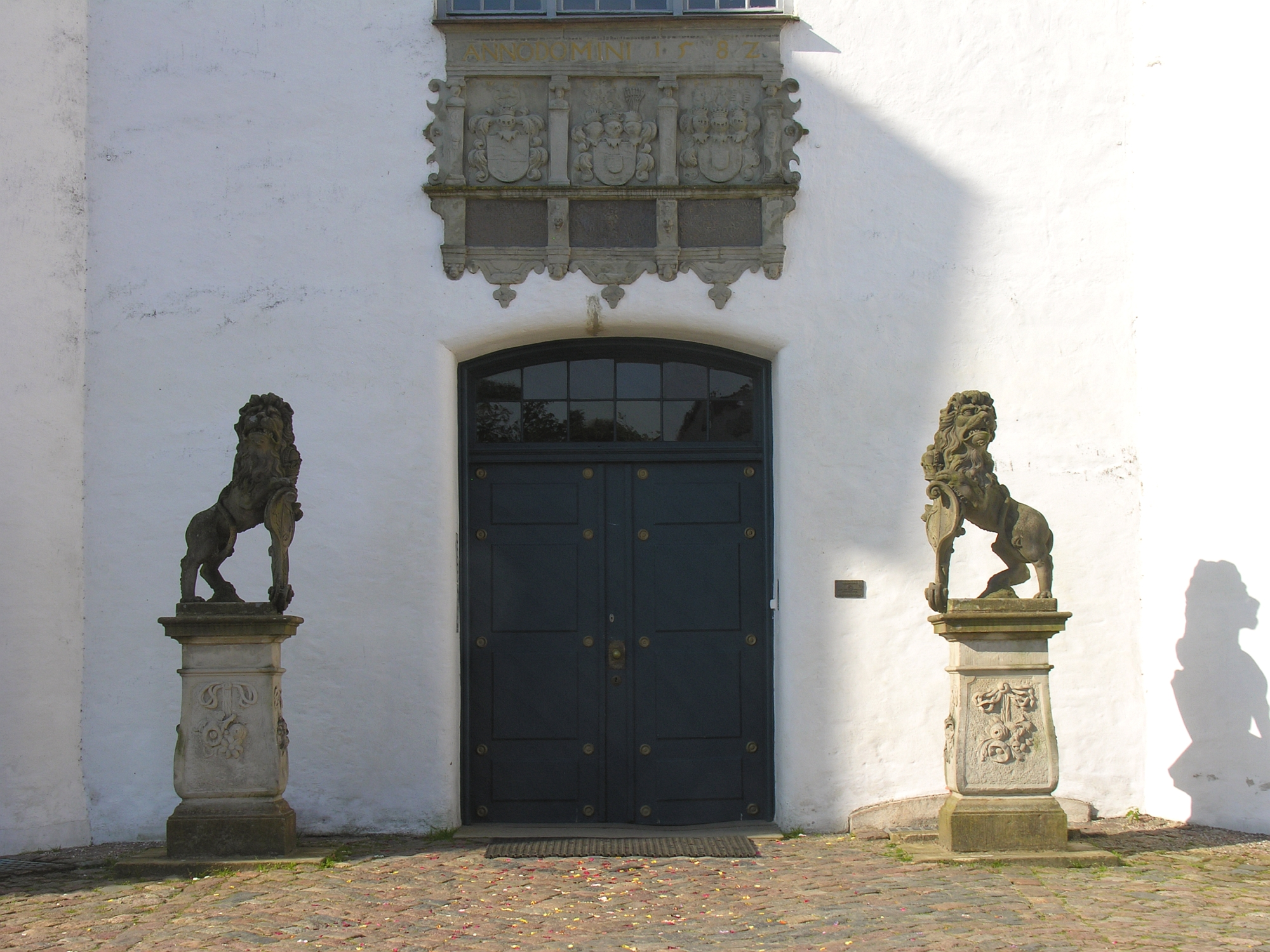 Kulturdenkmal 4.3 die beiden Löwen-Wappenhalter Postamente am Schloss-Portal von Schloss Glücksburg Schleswig-Holstein Foto 2012 Wolfgang Pehlemann Steinberg/Ostsee DSCN0242